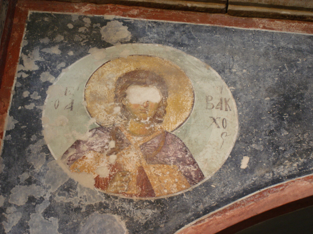 Istanbul: Museo di San Salvatore in Chora (Kariye Cami); Parecclesion. Affresco bizantino raffigurante San Bacco, uno dei due santi protettori dell'esercito bizantino. Probailmente è per questo che a differenza a quanto avvenuto agli altri affreschi, che sono rimasti intatti, questa immagine è stata sfregiata di proposito, come lo è stata in modo ancora più grave quella adiacente di san Sergio, il cui volto è quasi completamente obliterato. Foto di: Giovanni Dall'Orto, 29-5-2006.